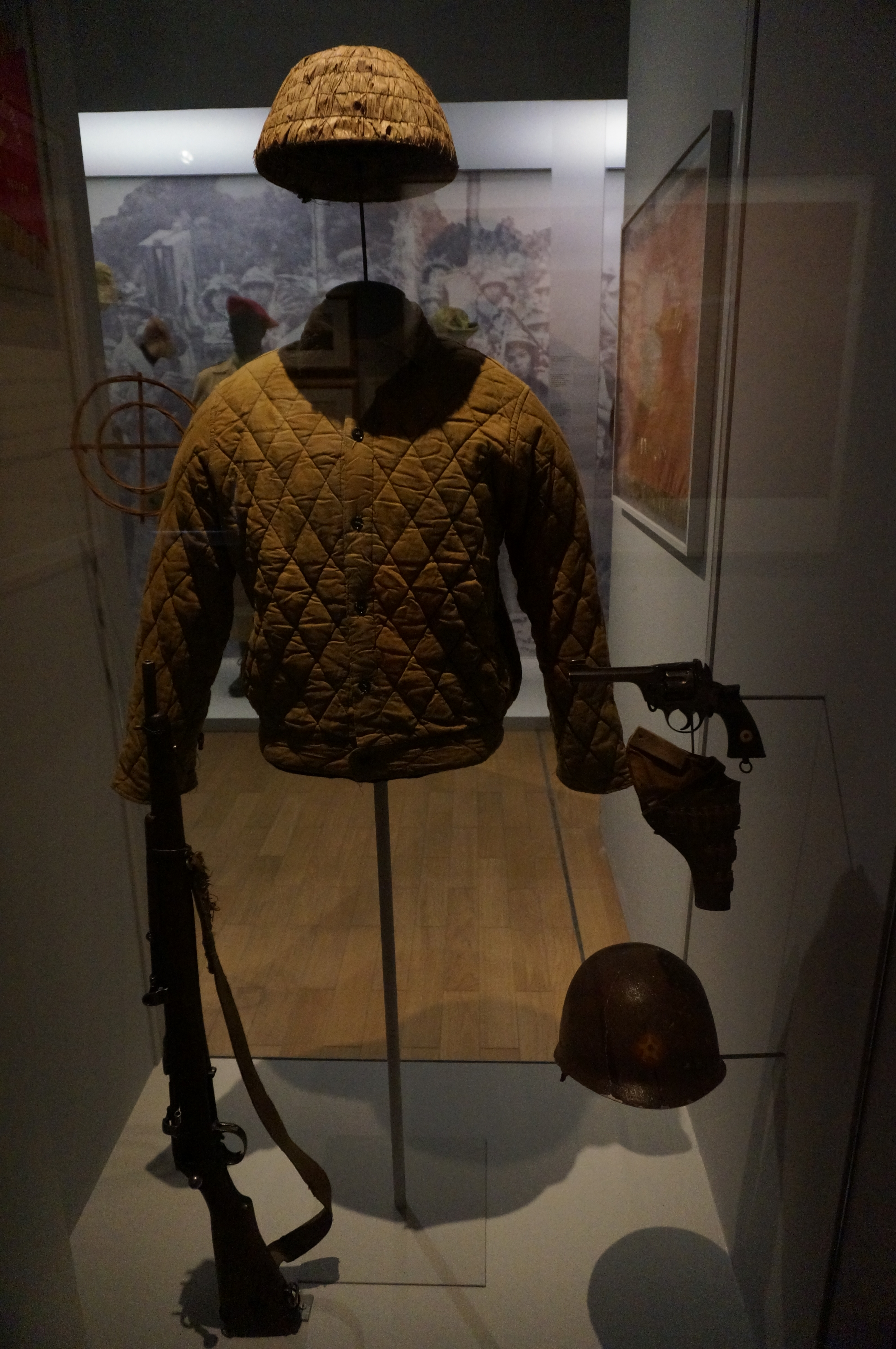 présenté lors de l'exposition Indochine des territoires et des hommes 1856.